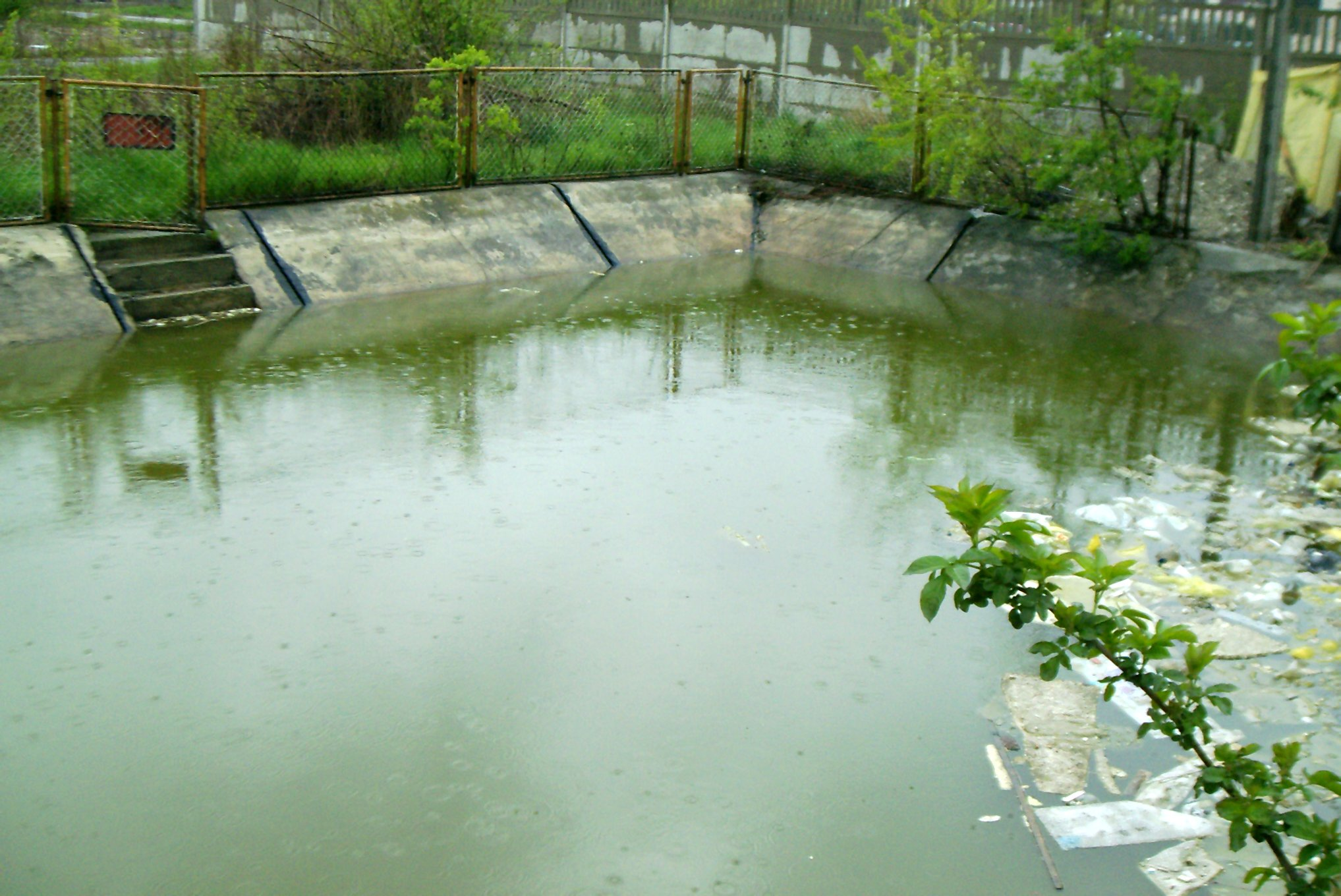 Nieużywany zbiornik przeciwpożarowy